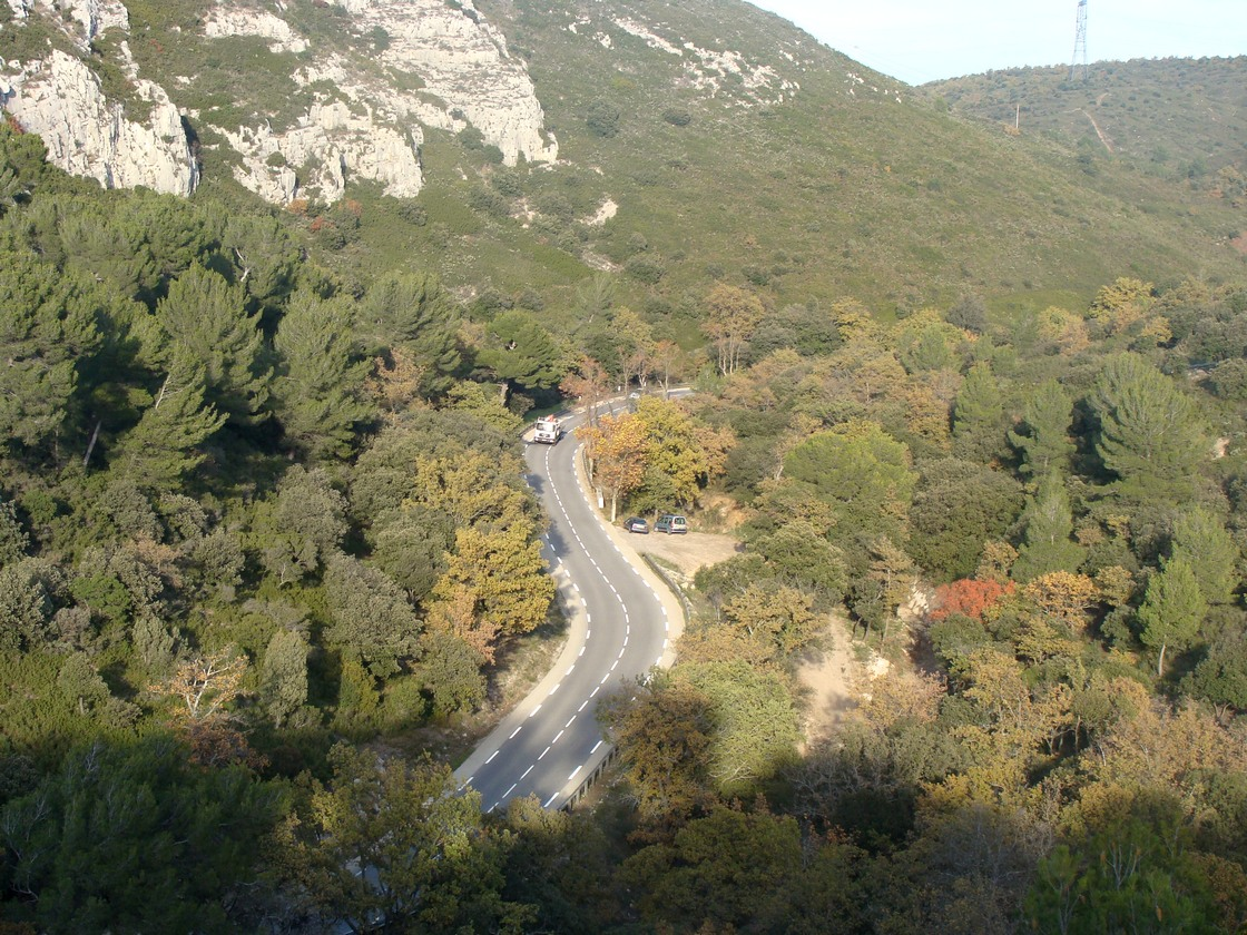 Le vallon de Pichauris et la route de Marseille à Trets vus depuis le Château de Ners.